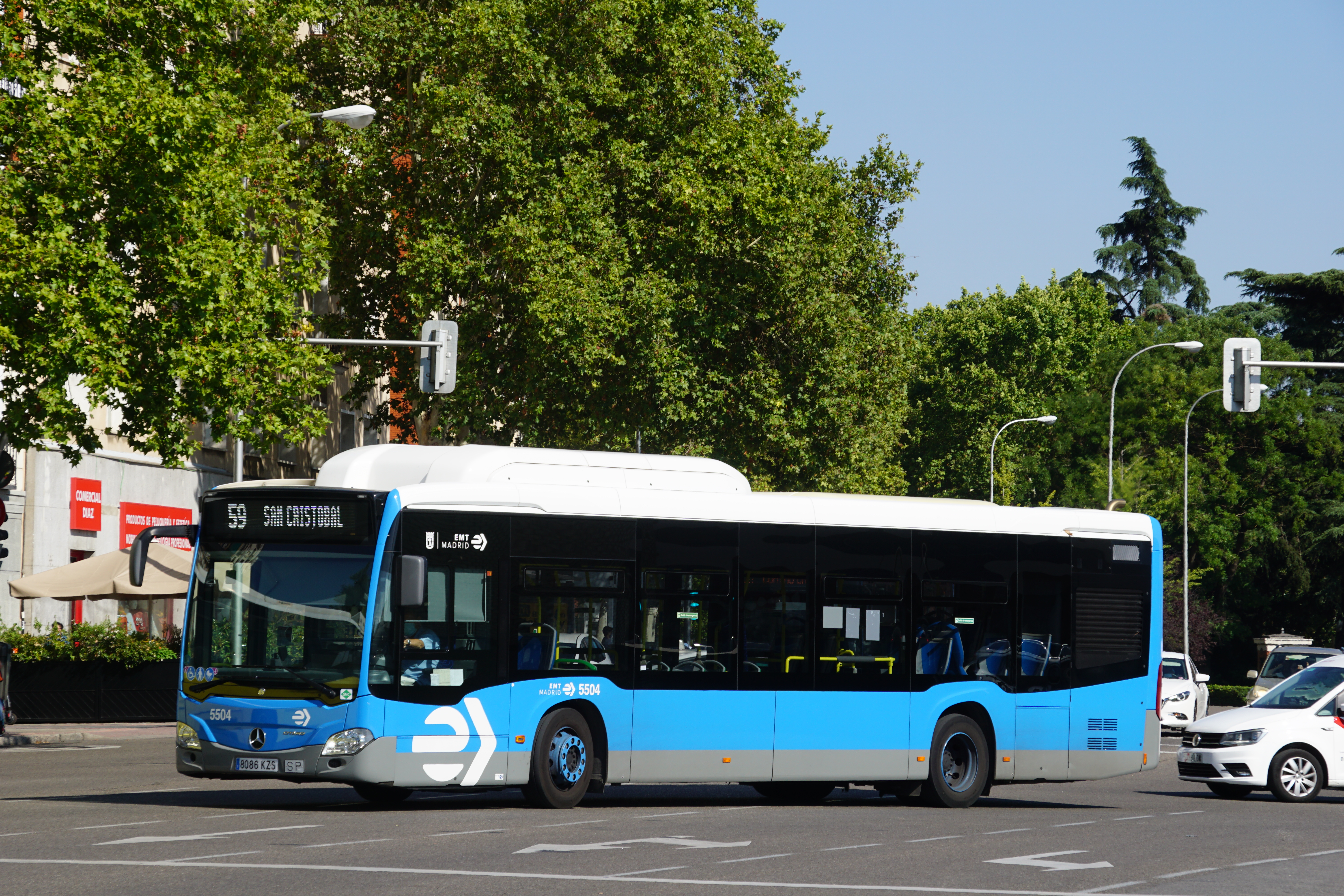 59 EMT Madrid en la estación de Atocha, agosto 2020